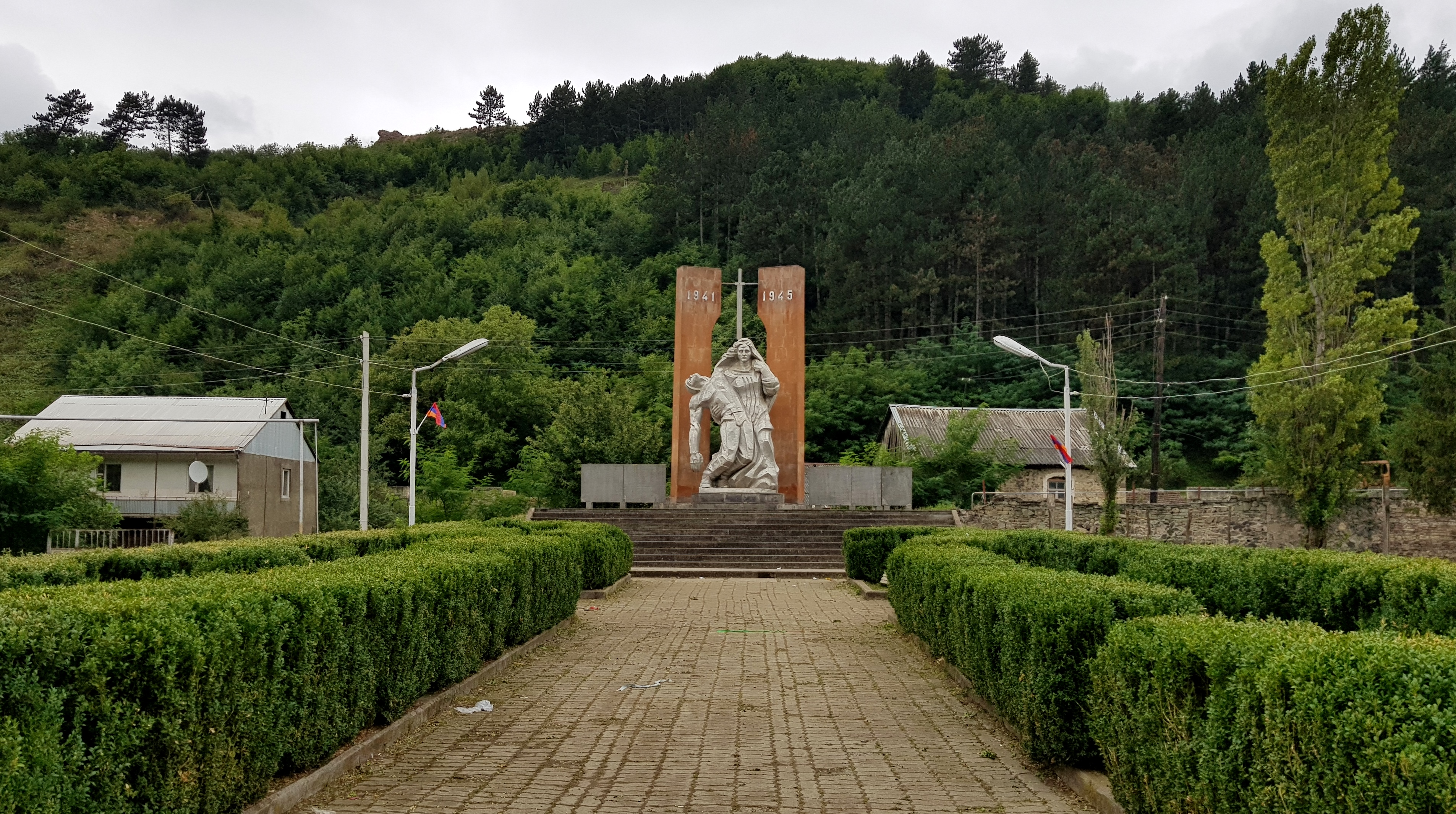 Երկրորդ աշխարհամարտում զոհվածների հուշարձանը Հաղարծինում 42/35